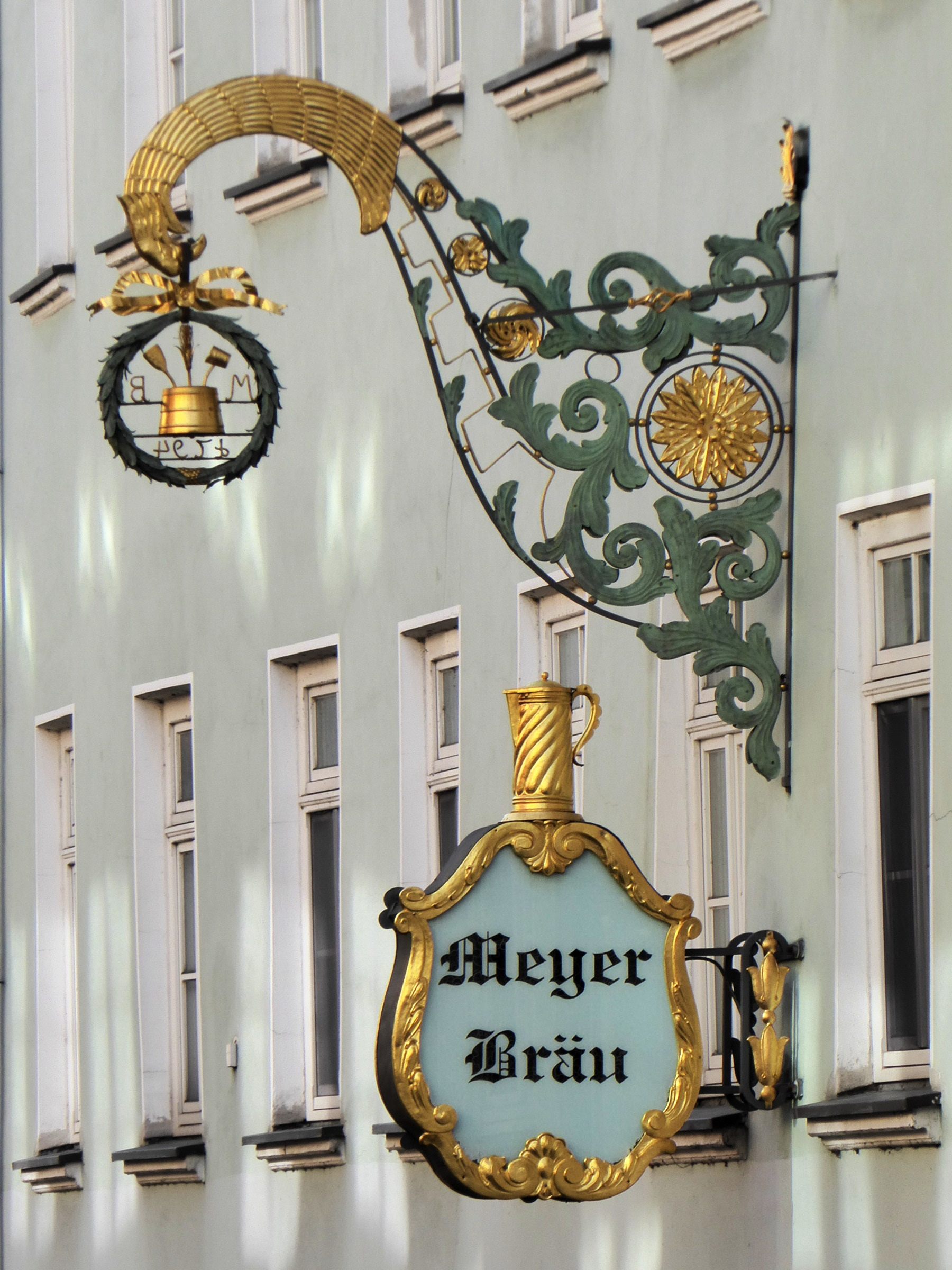 Zweiteiliges Nasenschild des Gasthofs Meyer-Bräu in Wasserburg am Inn (Schmidzeile).